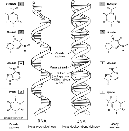 Porównanie DNA i RNA